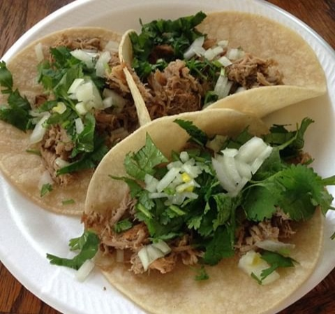 Los gallos son aperitivos tradicionales en Costa Rica, consisten en algún alimento servido con tortillas o pan. Unidad de Turismo, gallos de carne mechada con culantro y cebolla.